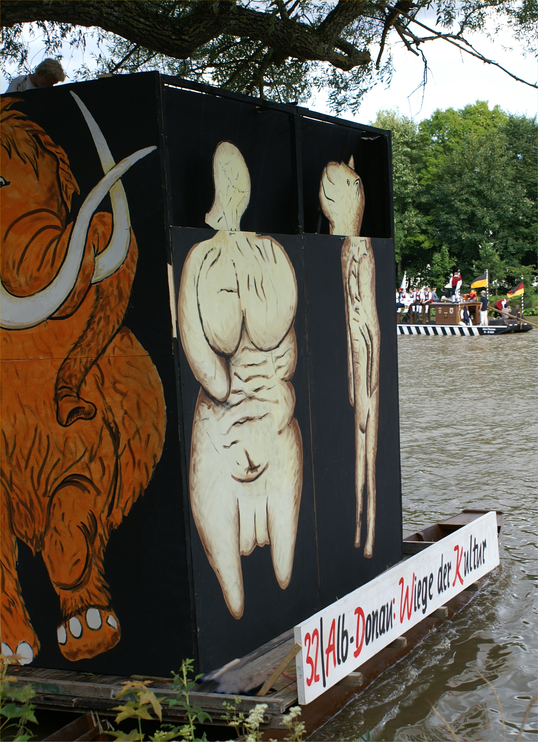 Alb-Donau: Wiege der Kultur. Die Schüler des Ulmer Humboldt-Gymnasiums machten die Funde des Löwenmenschen im Lonetal und der Venus vom Hohlen Fels zum Thema ihres Beitrags beim Ulmer Nabada